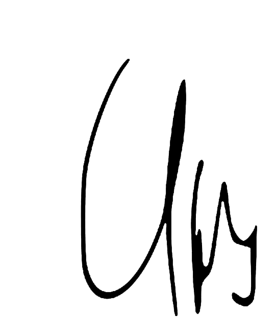 Autógrafo de Urs Bühler, de Il Divo